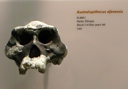 AL 444-2, Australopithecus afarensis male. Replica